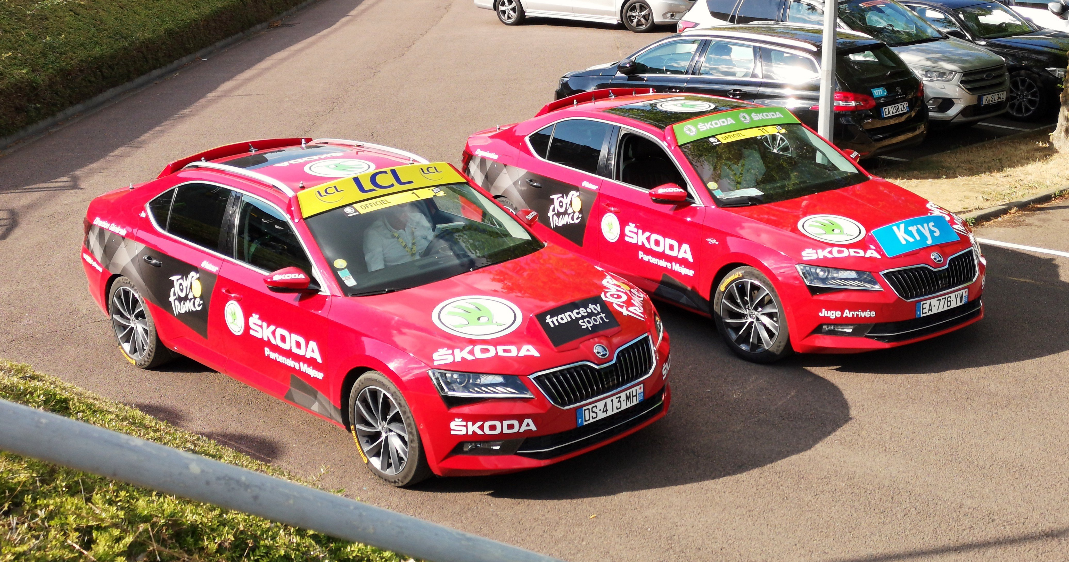 2015 Skoda Superb (2.0 TDI 180 hp) at Chalon sur Saone